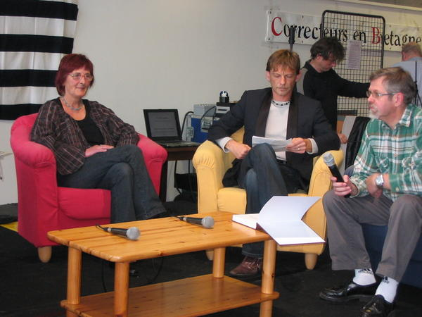 Mich Beyer, Yann-Fulup Dupuy ha Herve Latimier